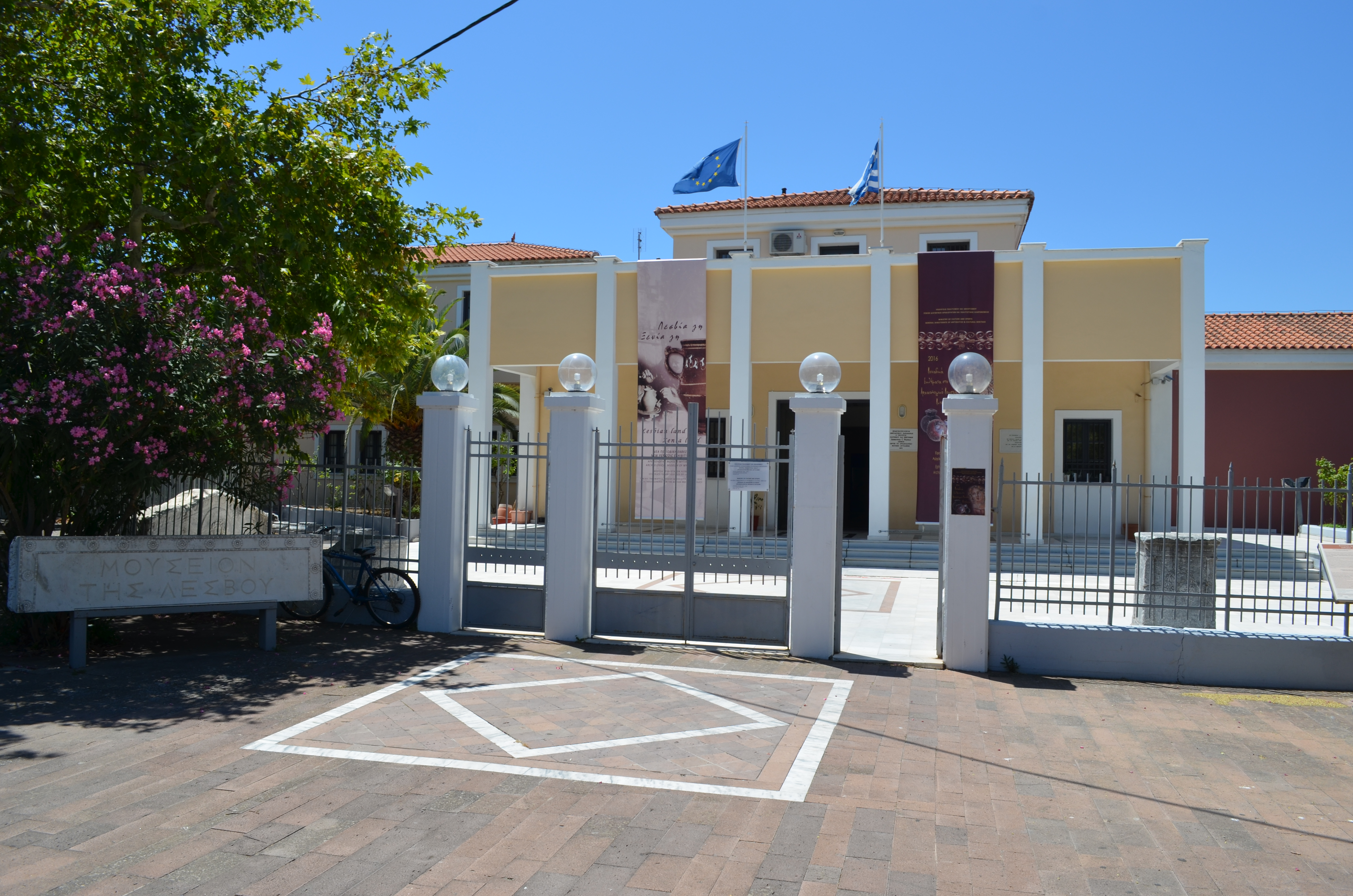 Das 1995 neu eröffnete Archäologische Museum in Mytilini auf Lesbos